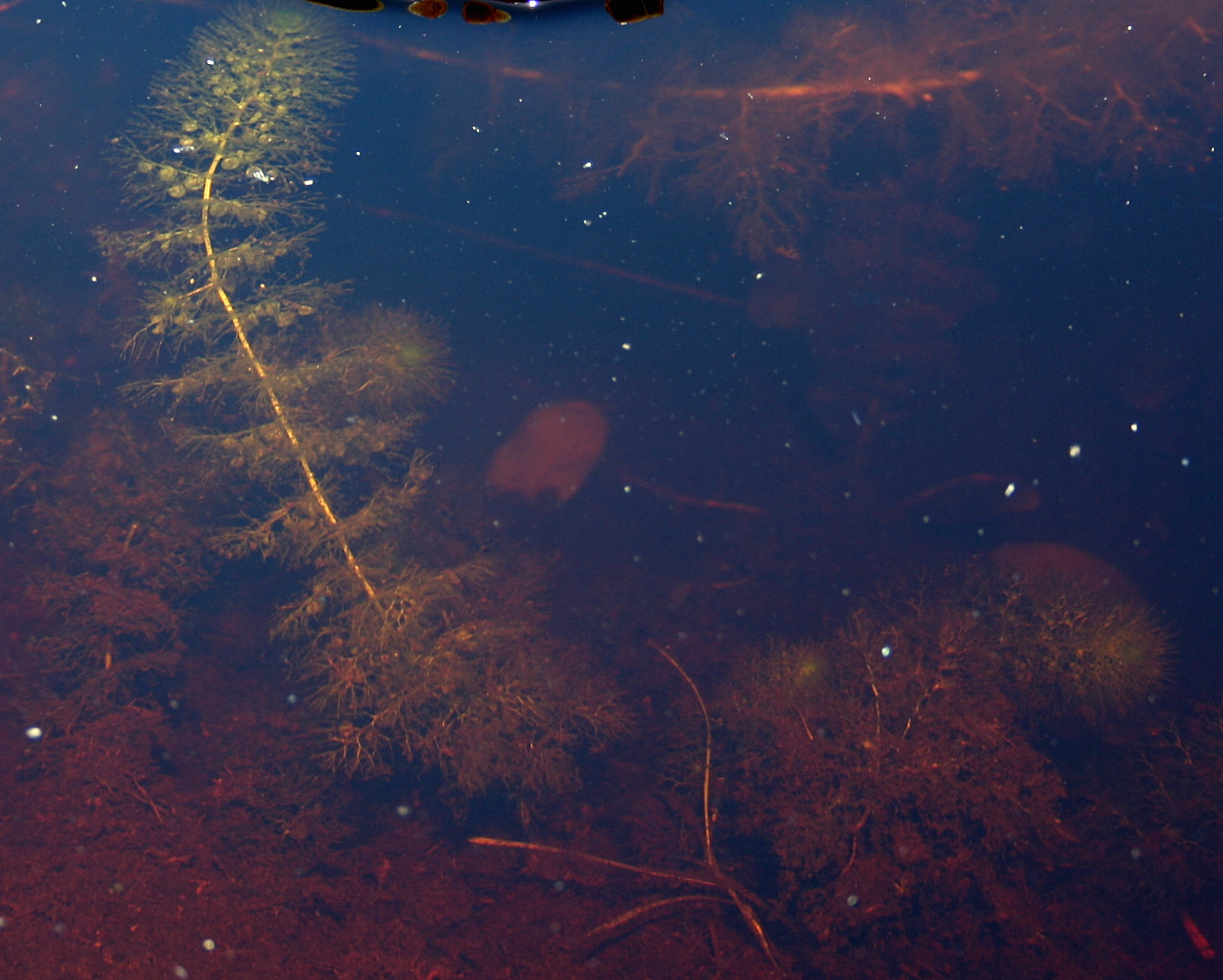 Park Narodowy Bory Tucholskie, Pływacz zwyczajny w swoim naturalnym środowisku